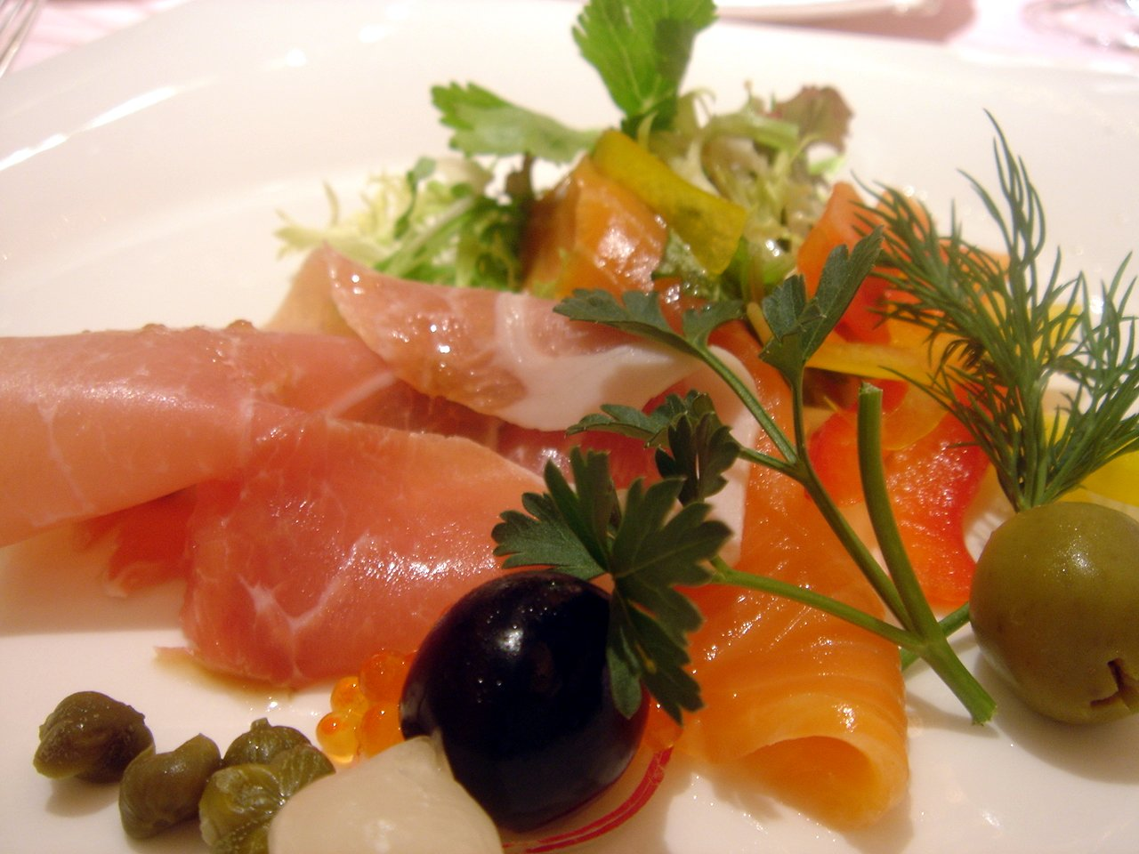 Salade de jambon cru et saumon fumé. (salad of ham and smoked salmon)